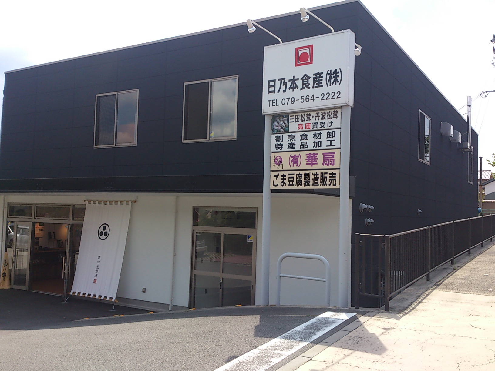 日乃本食産株式会社 三田見野屋